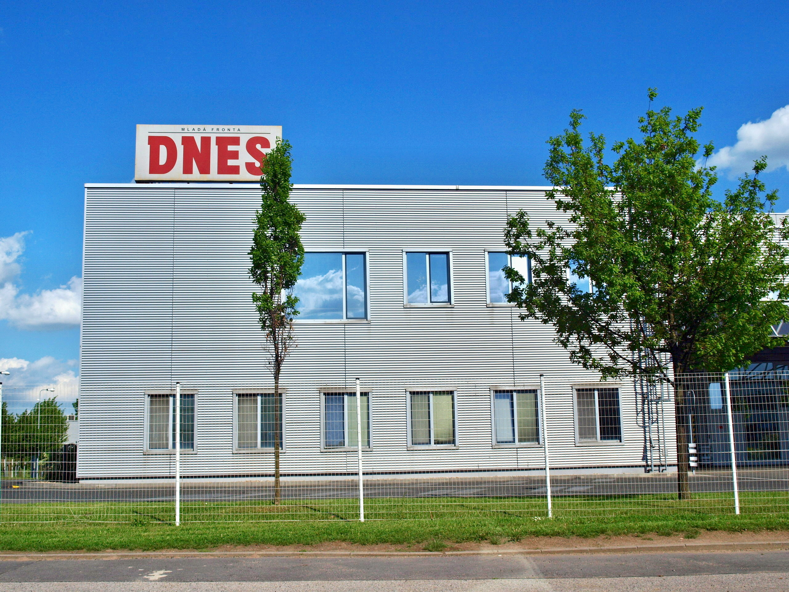 Malešice